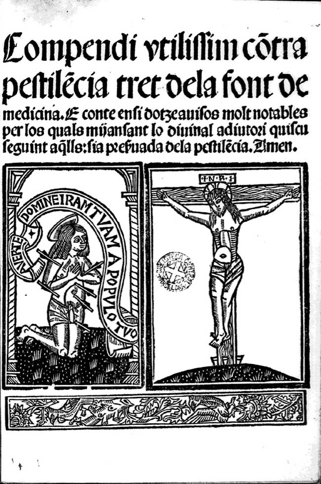 Compendi utilissim contra pestilencia tret de la font de medecina e conte en si dotze auisos molt notables, de Valesco de Tarenta. Trad. de Joan Vilar. Impr. per Joan Rosembach